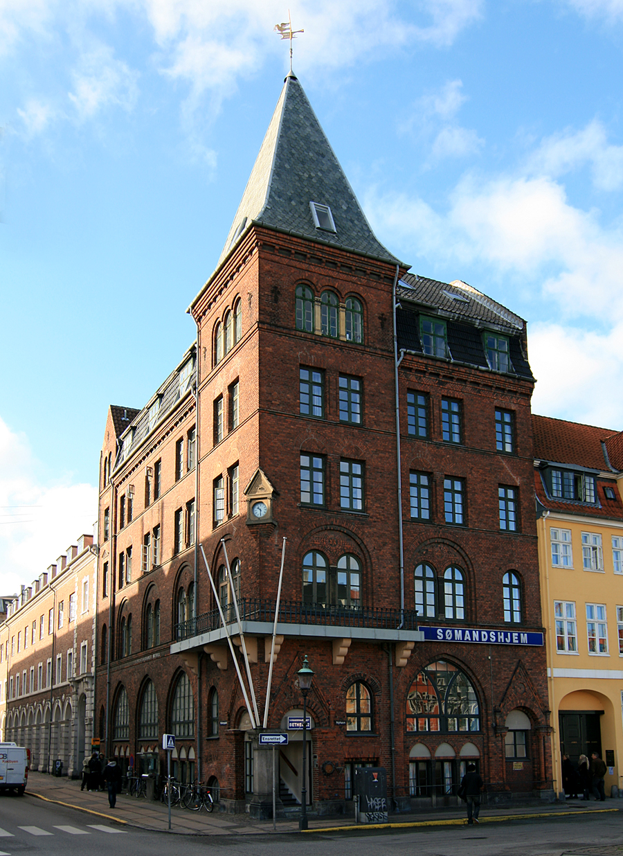 Sømandshjemmet Bethel, Nyhavn 24, København. Bygget 1906.